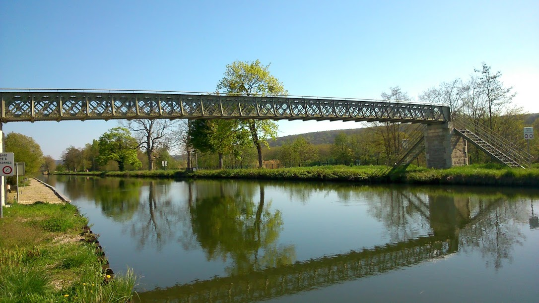 Passerelle Mangin au-dessus du canal à Richardménil en Meurthe-et-Moselle, Lorraine, France